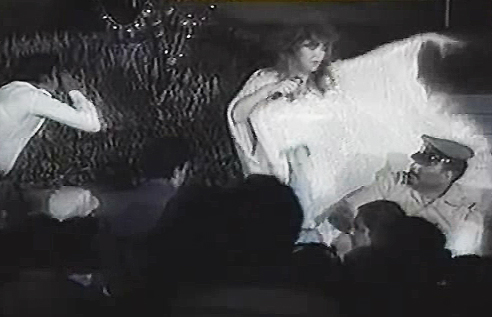 Пугачёва на открытии фестиваля в Дели, 1987